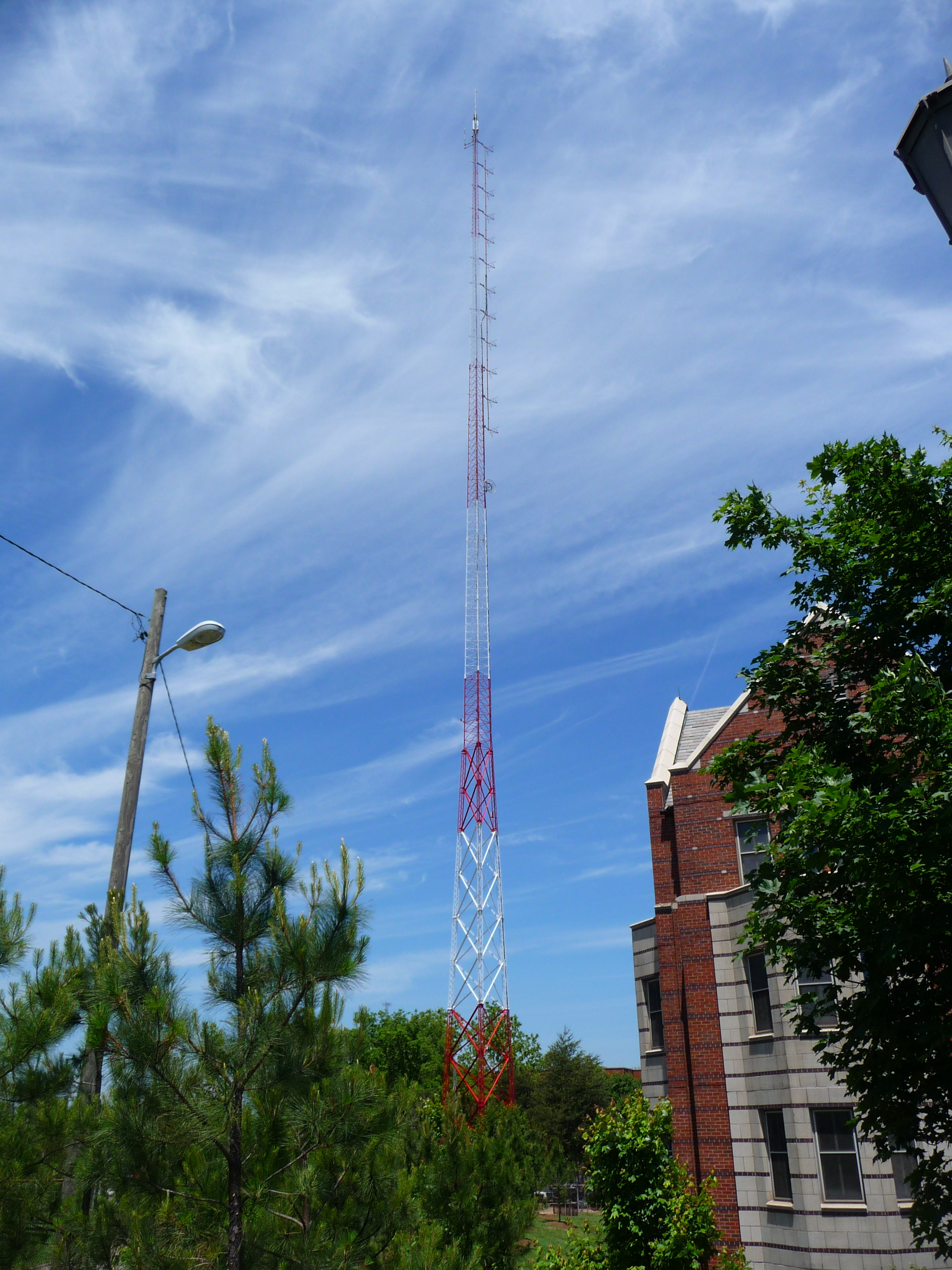 WREK tower